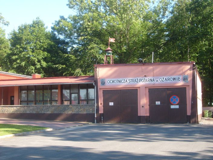 Remiza OSP w Ożarowie